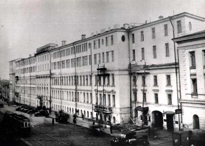 Реконструкция Запасного дворца по проекту Ивана Фомина